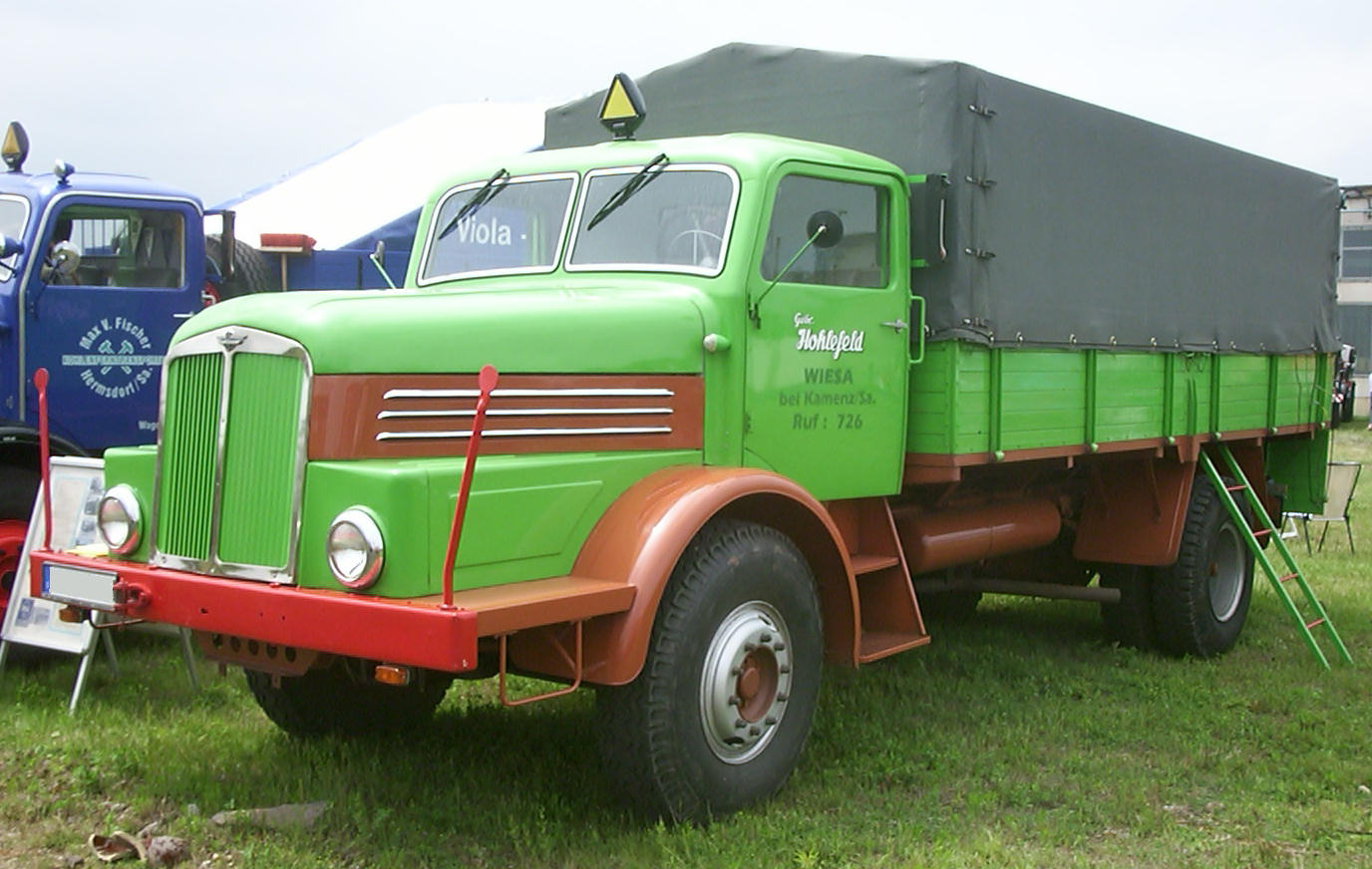 IFA H6 als Pritschenwagen mit Plane